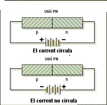 Paper de les impureses en un diode semiconductor